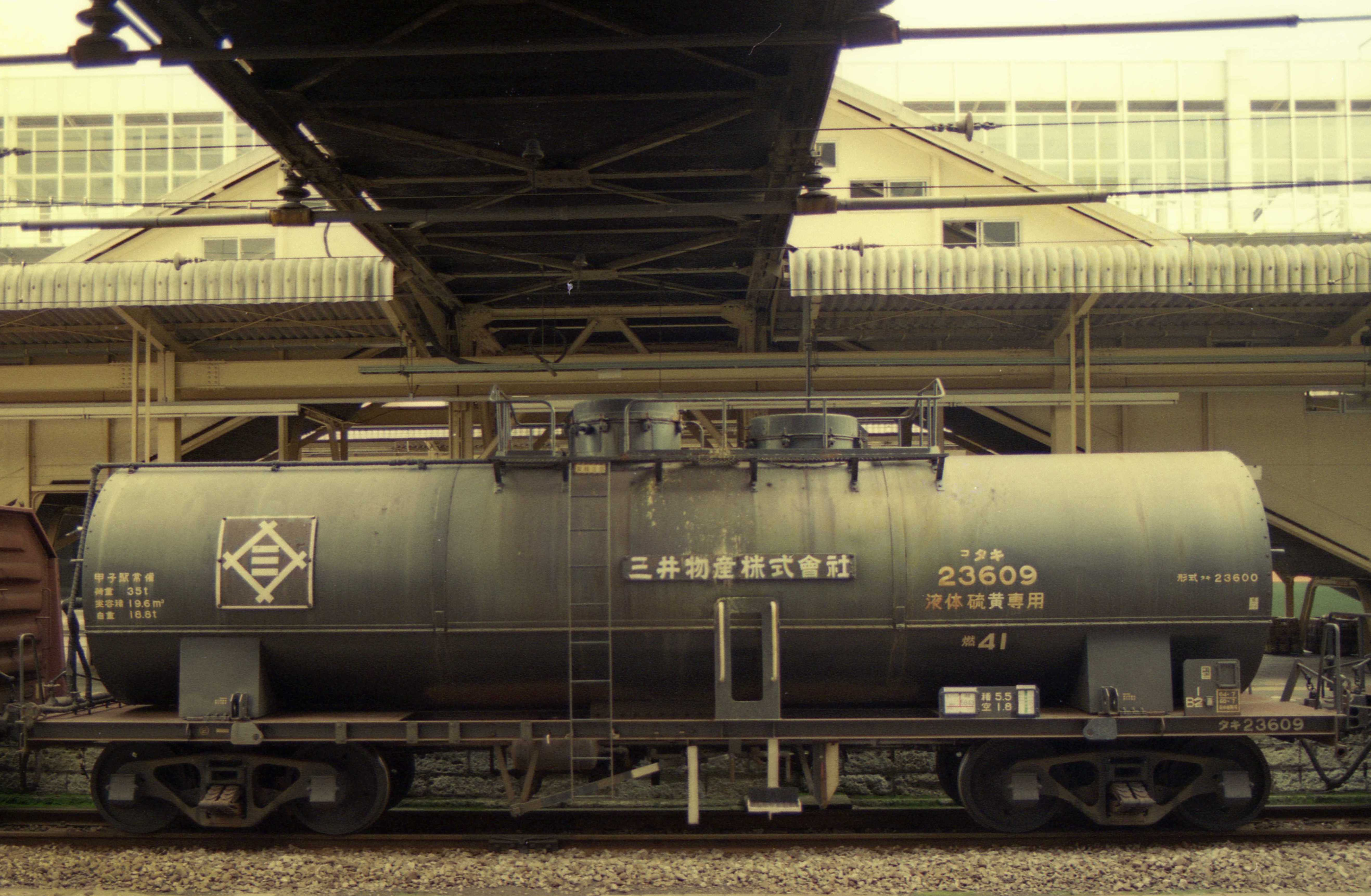 国鉄タキ23600形タキ23609。1986年10月4日、高崎駅にて。